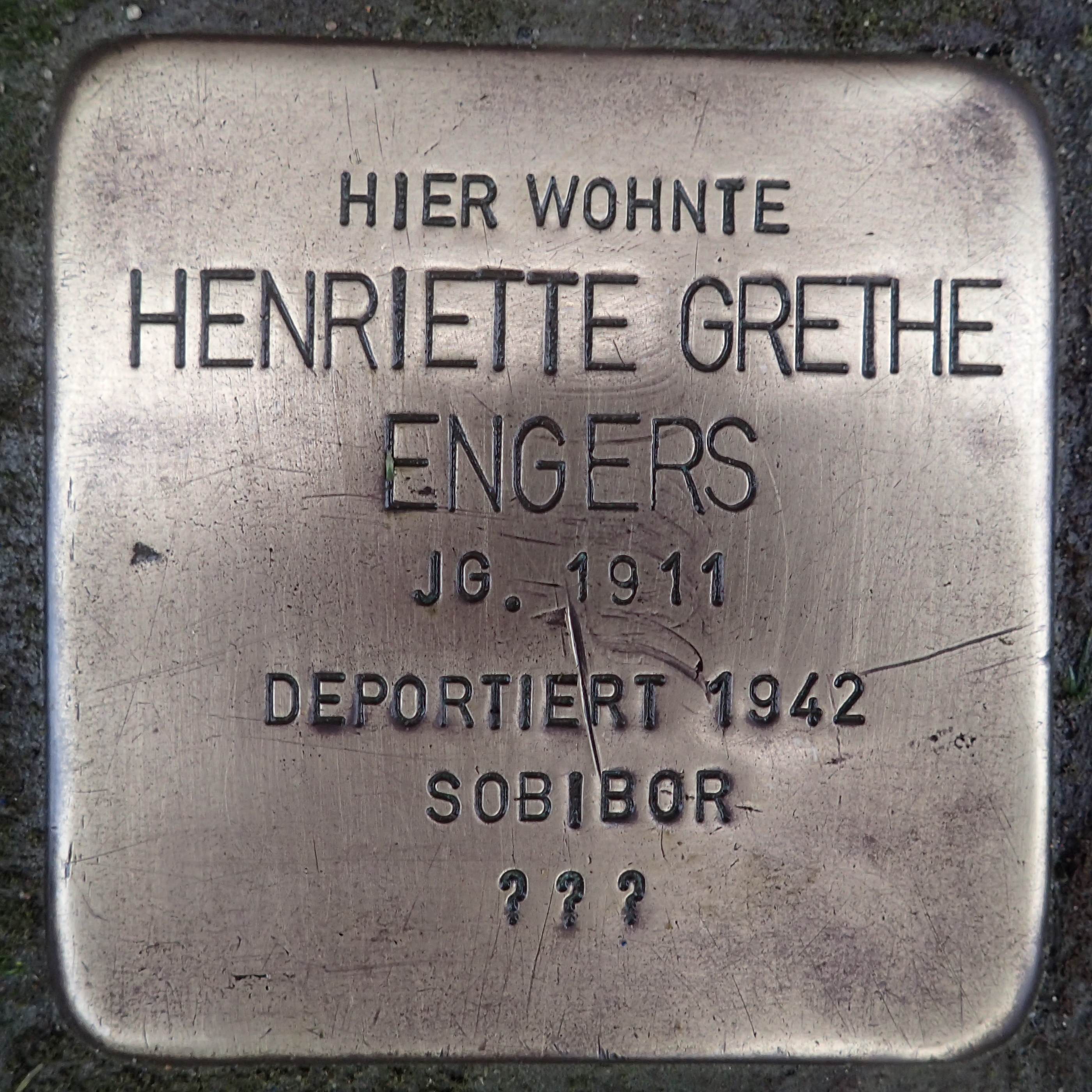 Stolperstein Geldern Harttor 21 Henriette Grethe